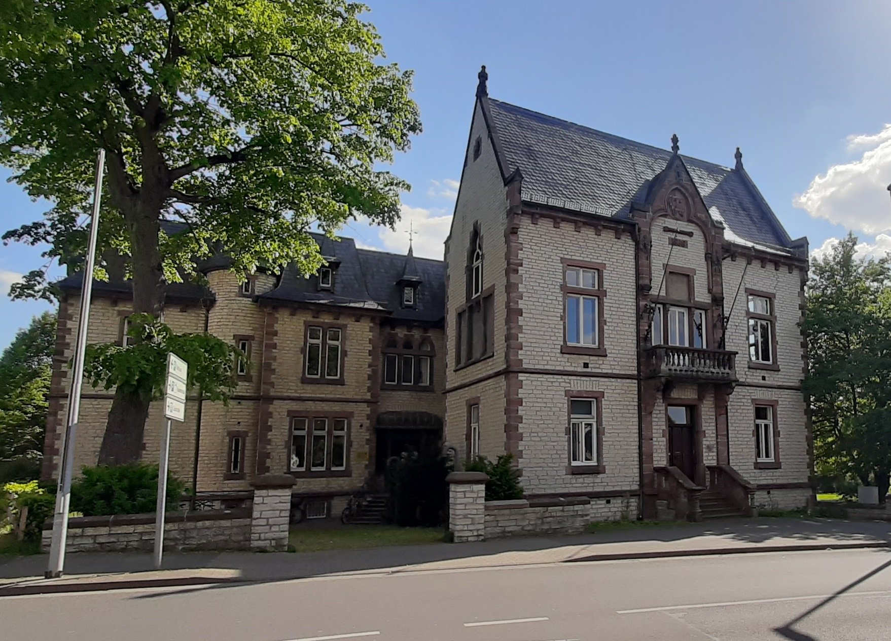 Ständehaus Beckum